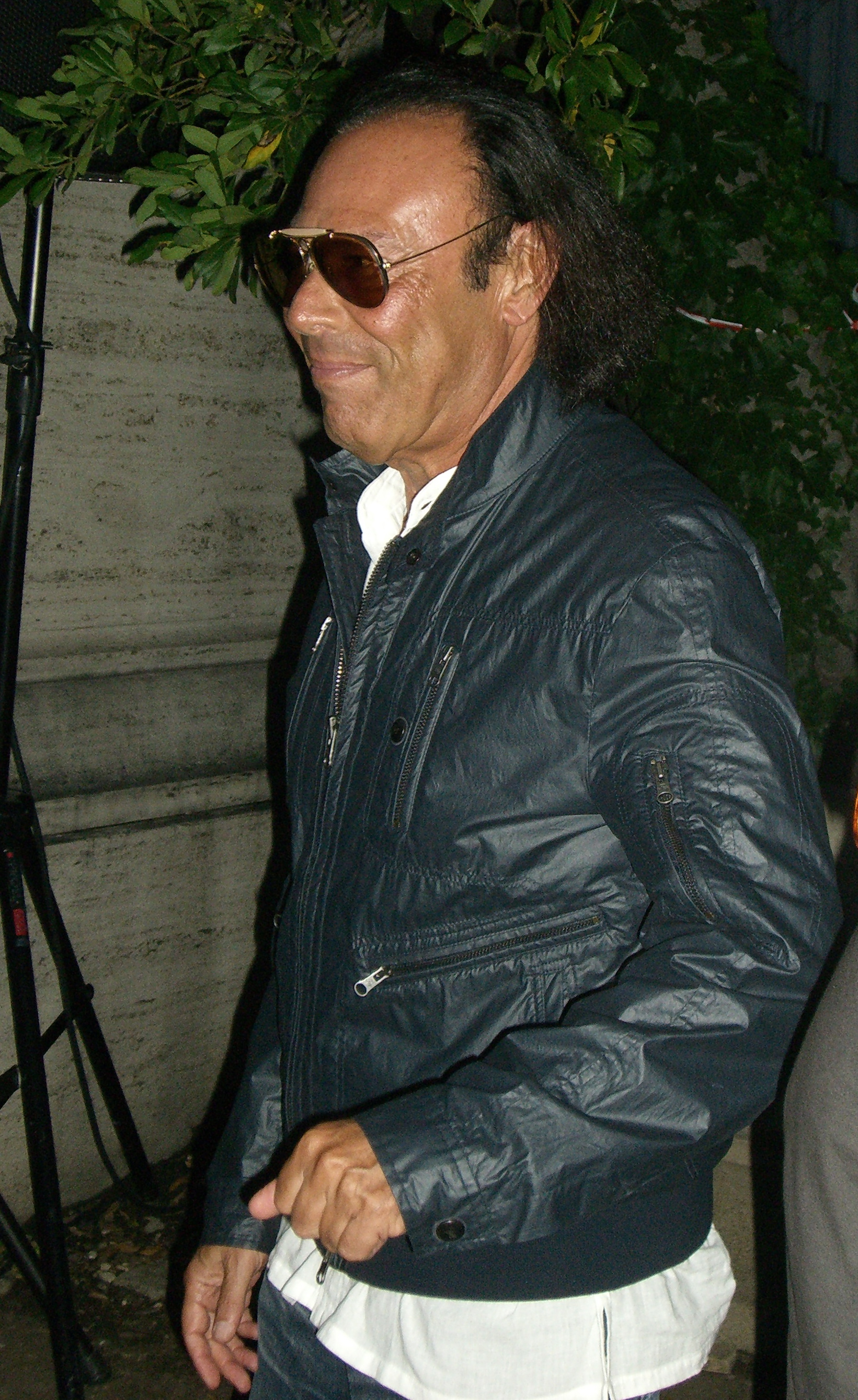 Il cantautore Antonello Venditti